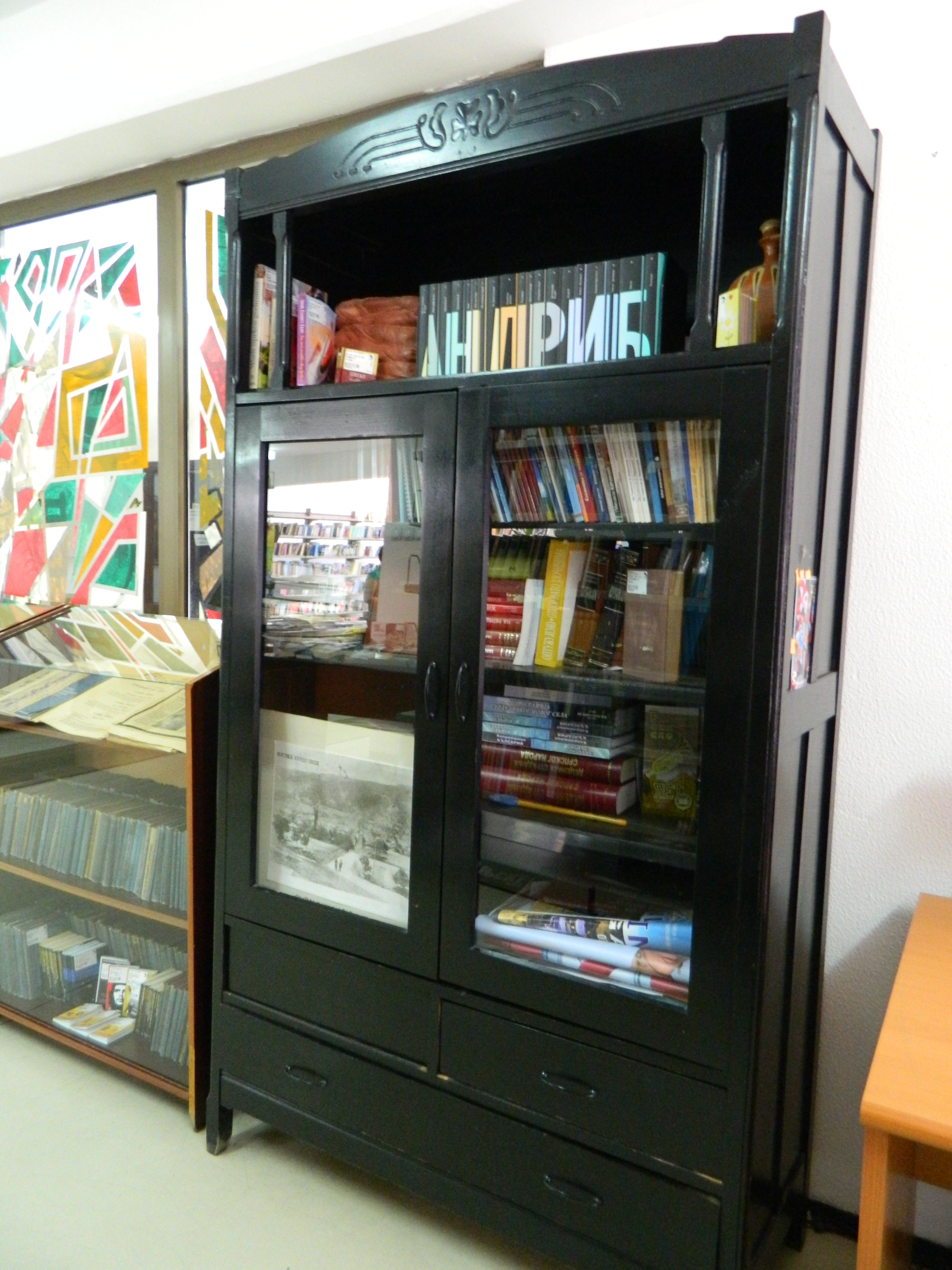 Zavičajna zbirka biblioteke "Radoje Domanović", Surdulica